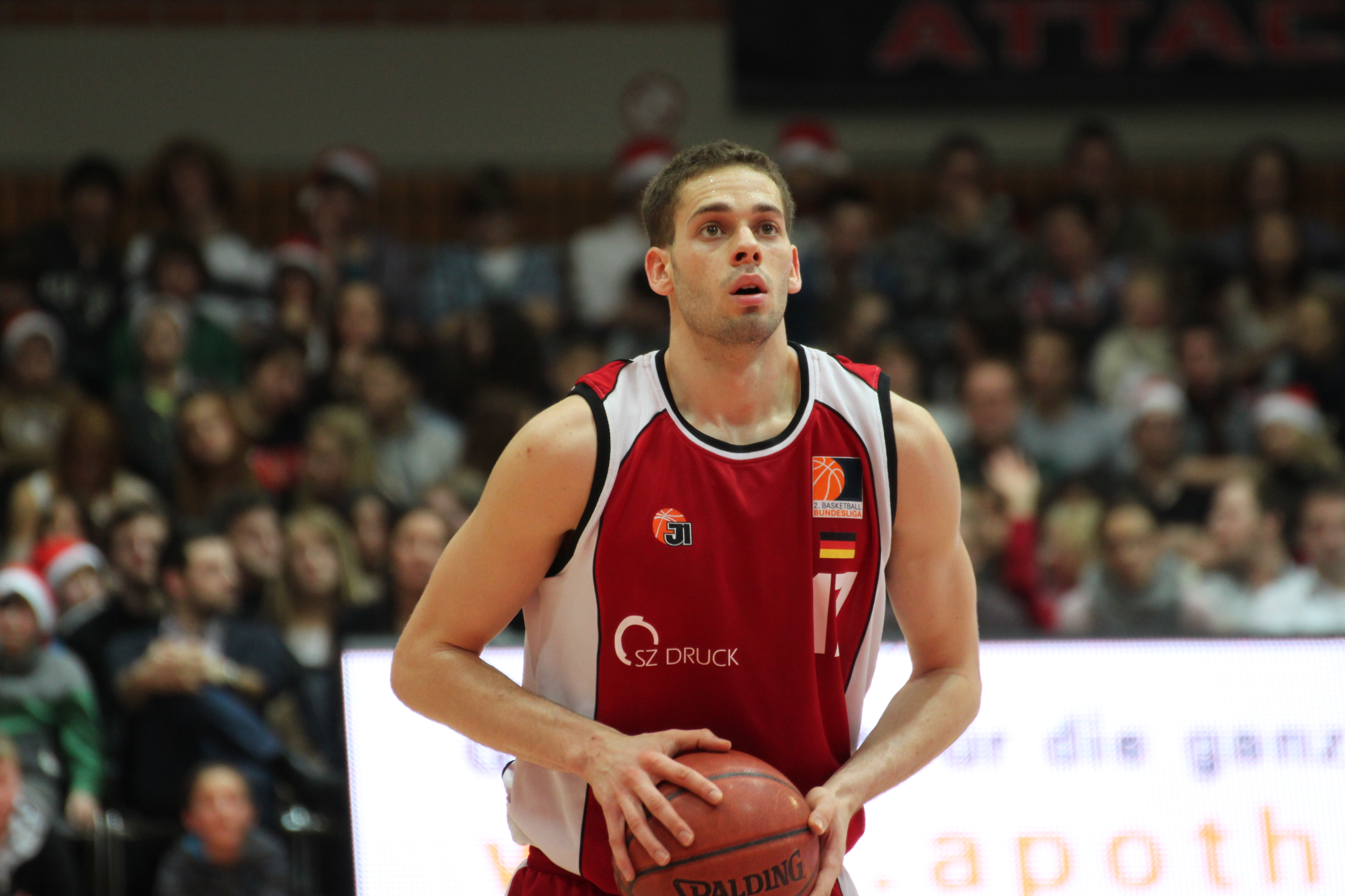 Jonas Wohlfarth-Bottermann (Dragons Rhöndorf) bei einem spiel gegen S. Oliver Baskets am 22. dezember 2010